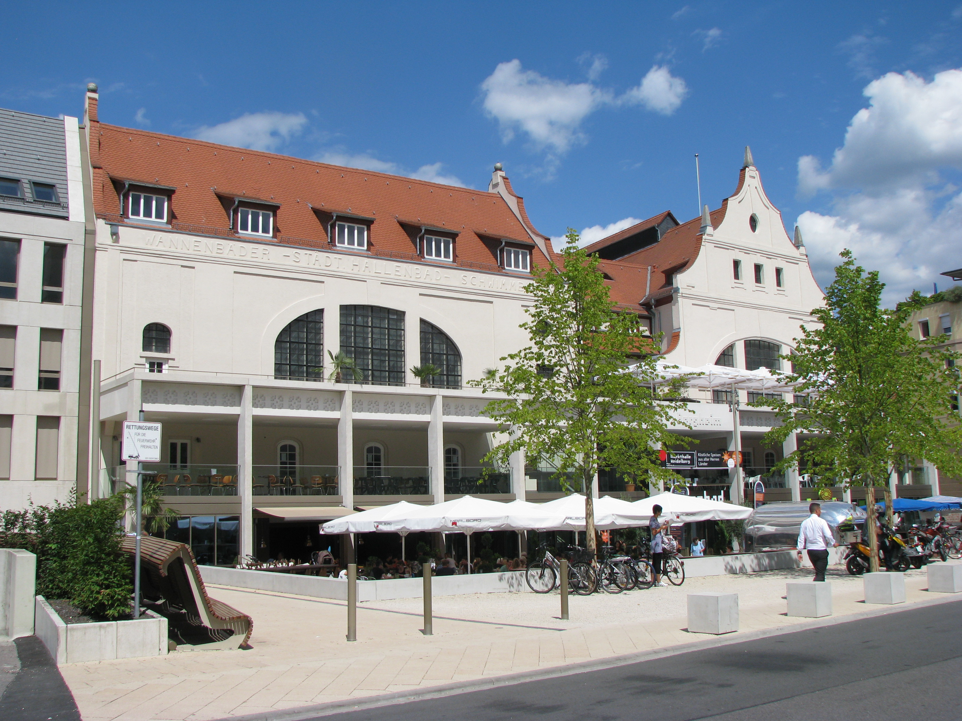 Das Alte Hallenbad in Heidelberg-Bergheim: Ansicht von Süden